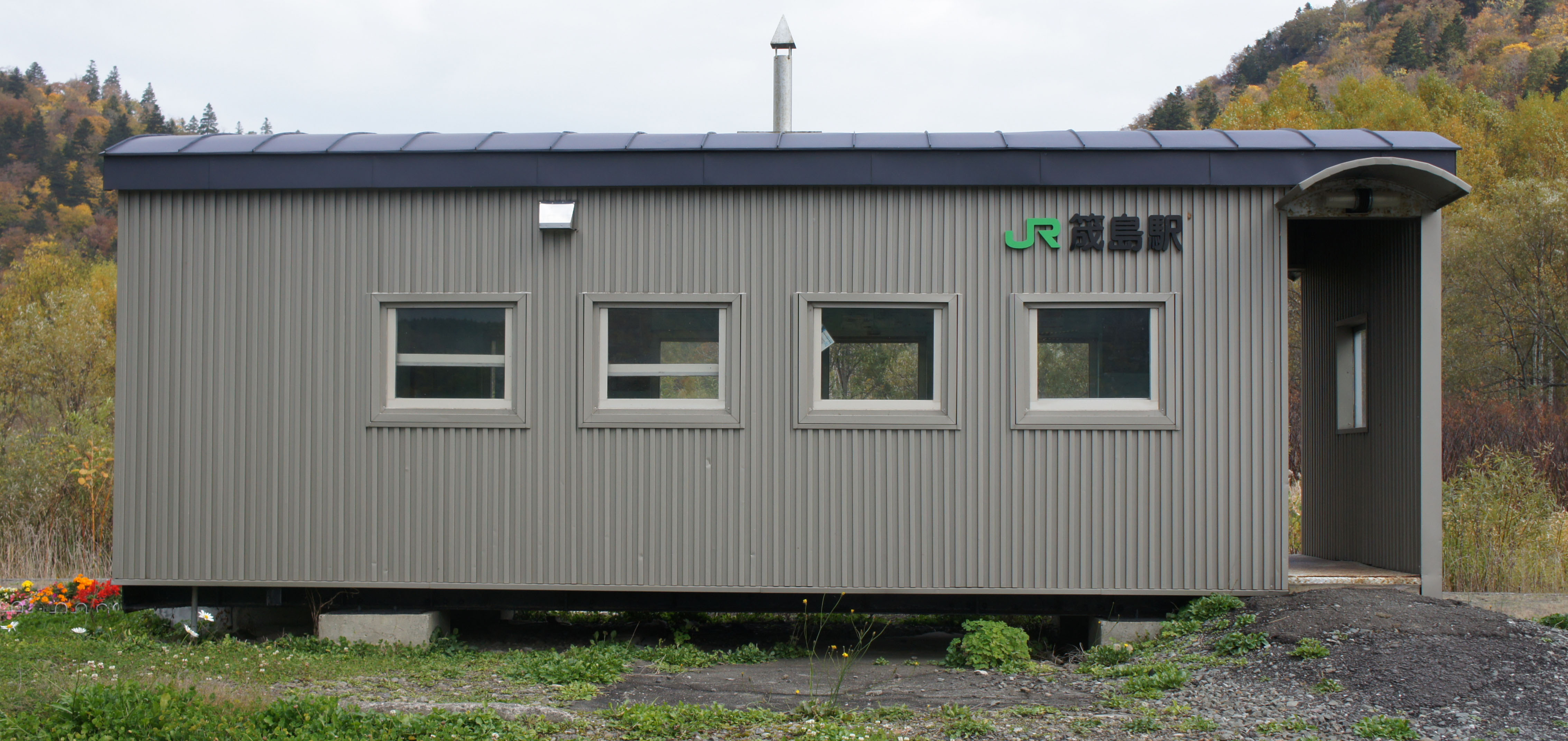 JR宗谷本線・筬島駅の駅舎 Sony NEX-3